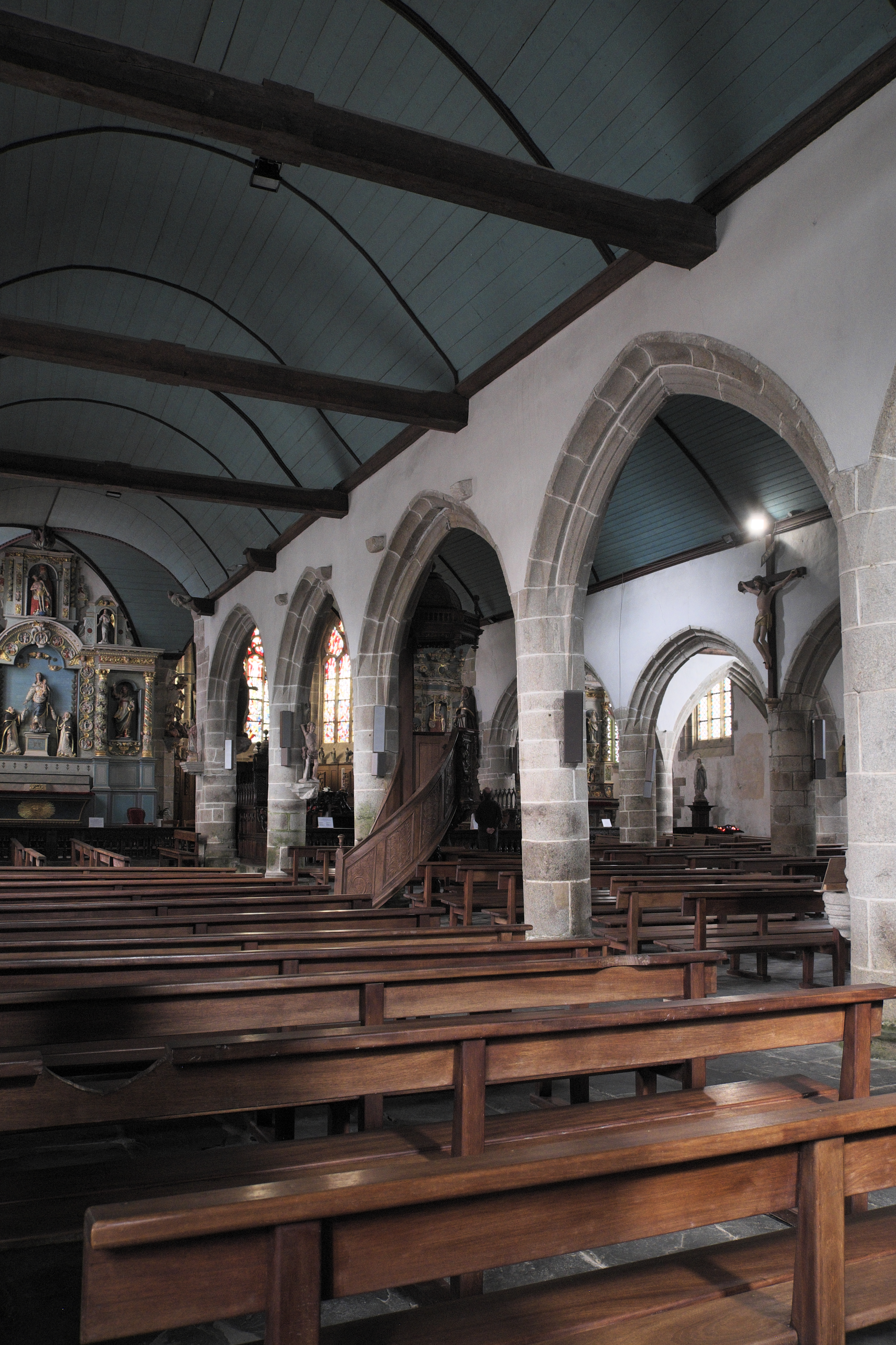 Katholische Pfarrkirche Saint-Miliau in Guimiliau im Département Finistère (Region Bretagne/Frankreich), Innenraum